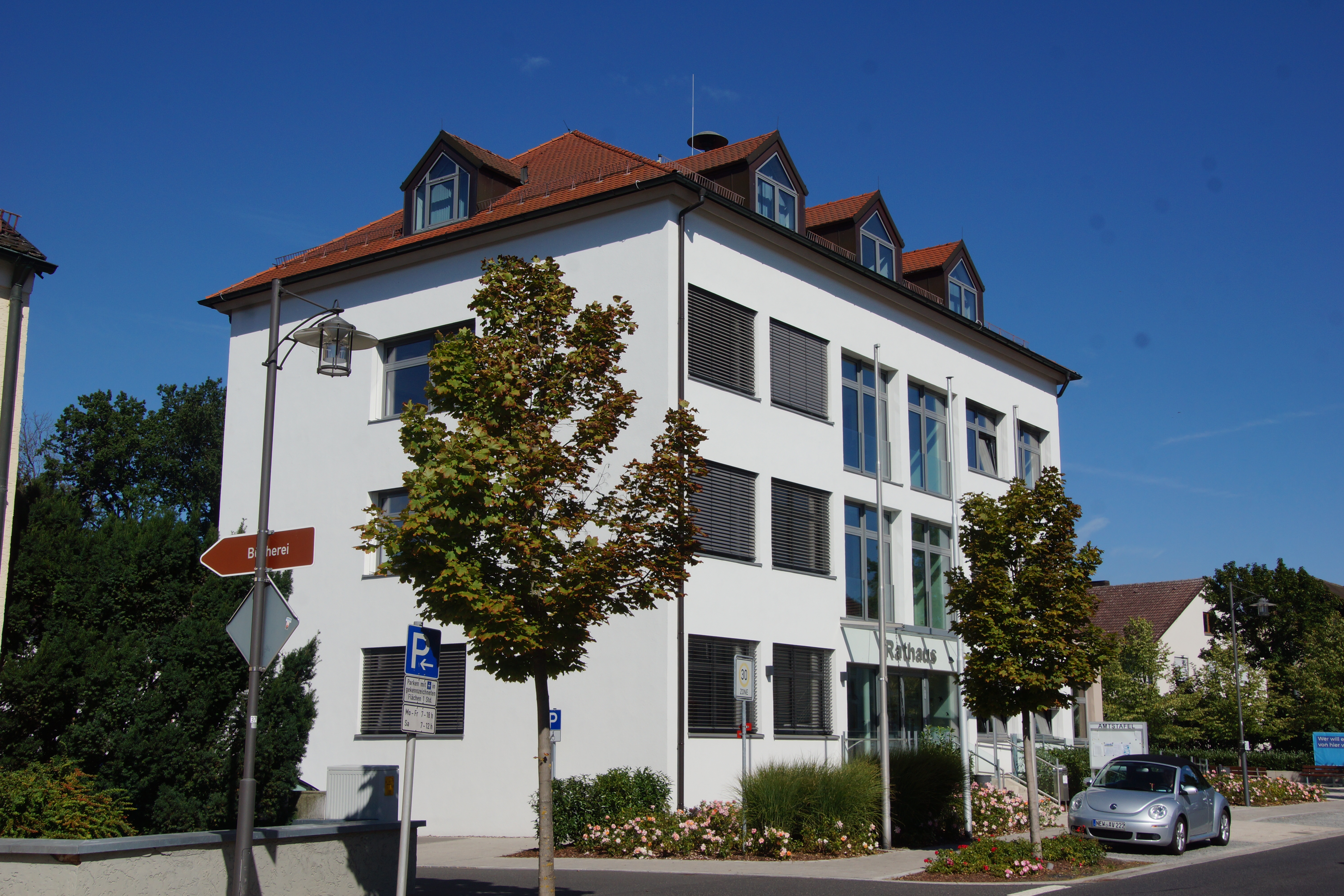 Schirmitz